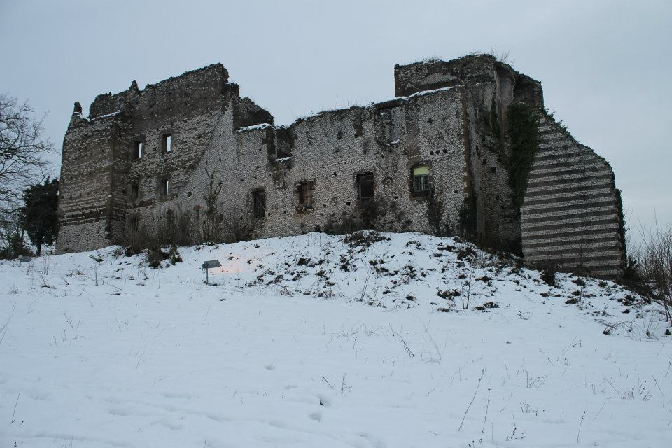 Castello vecchio di Colleferro sotto la neve